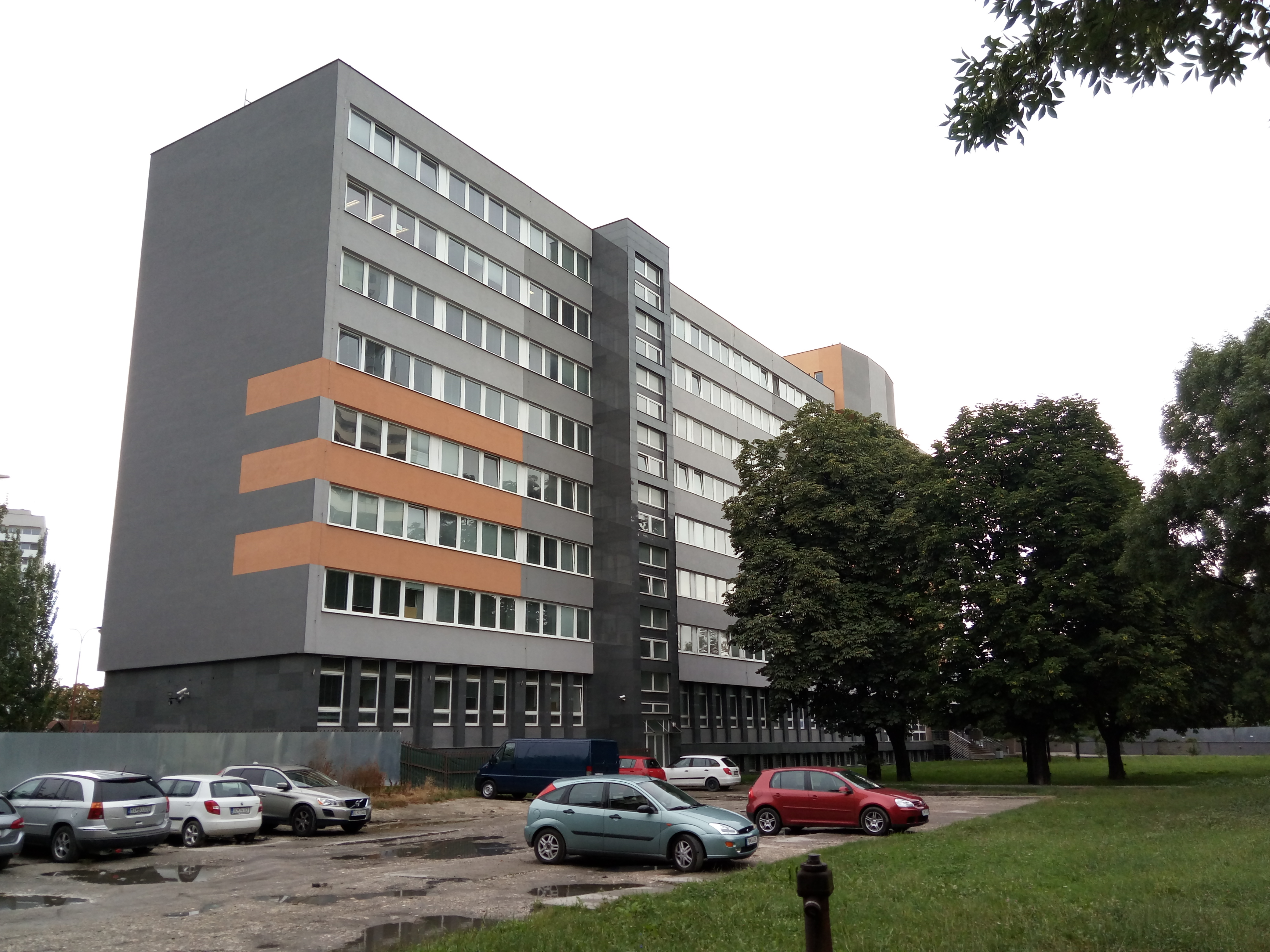 Ružová dolina 6, Ružinov, Bratislava